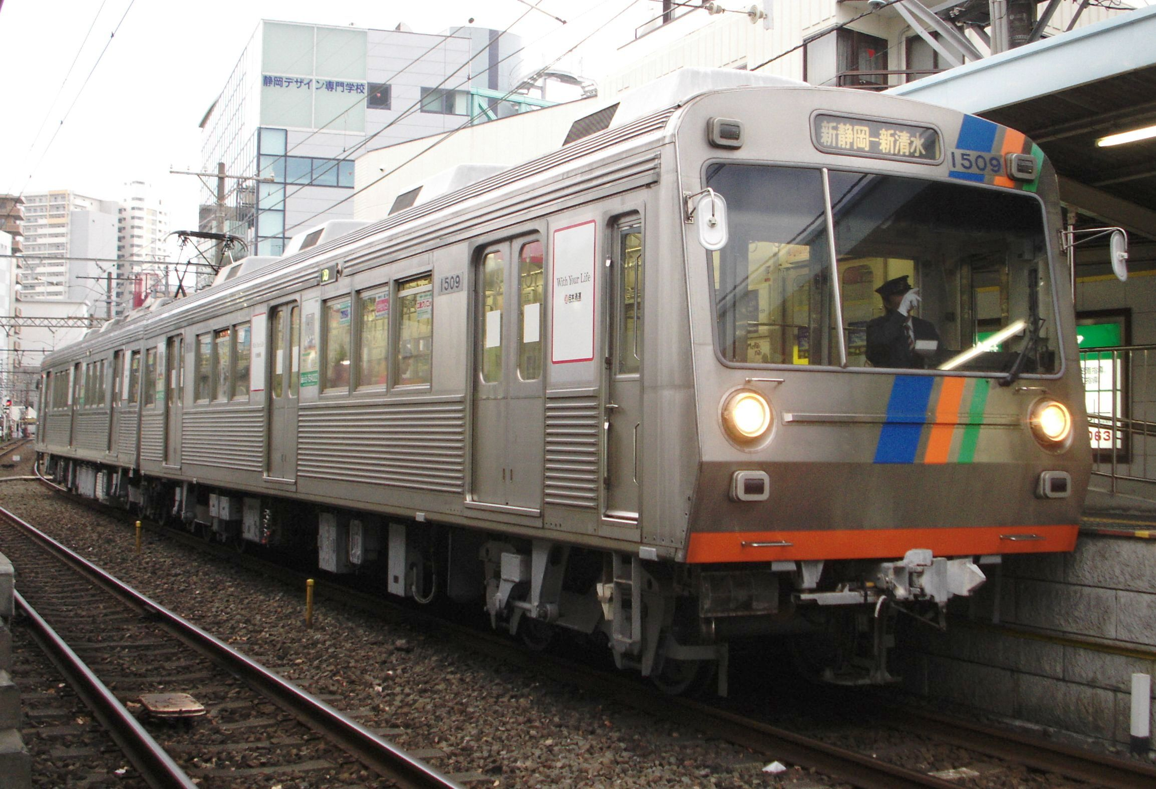 静岡鉄道1000系電車 静岡鉄道日吉町駅で撮影